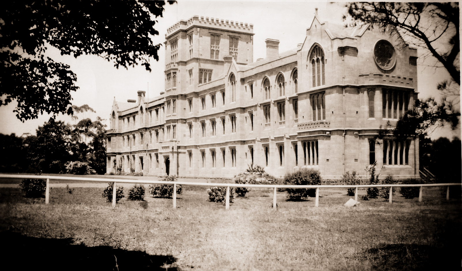 Queen's College 1926